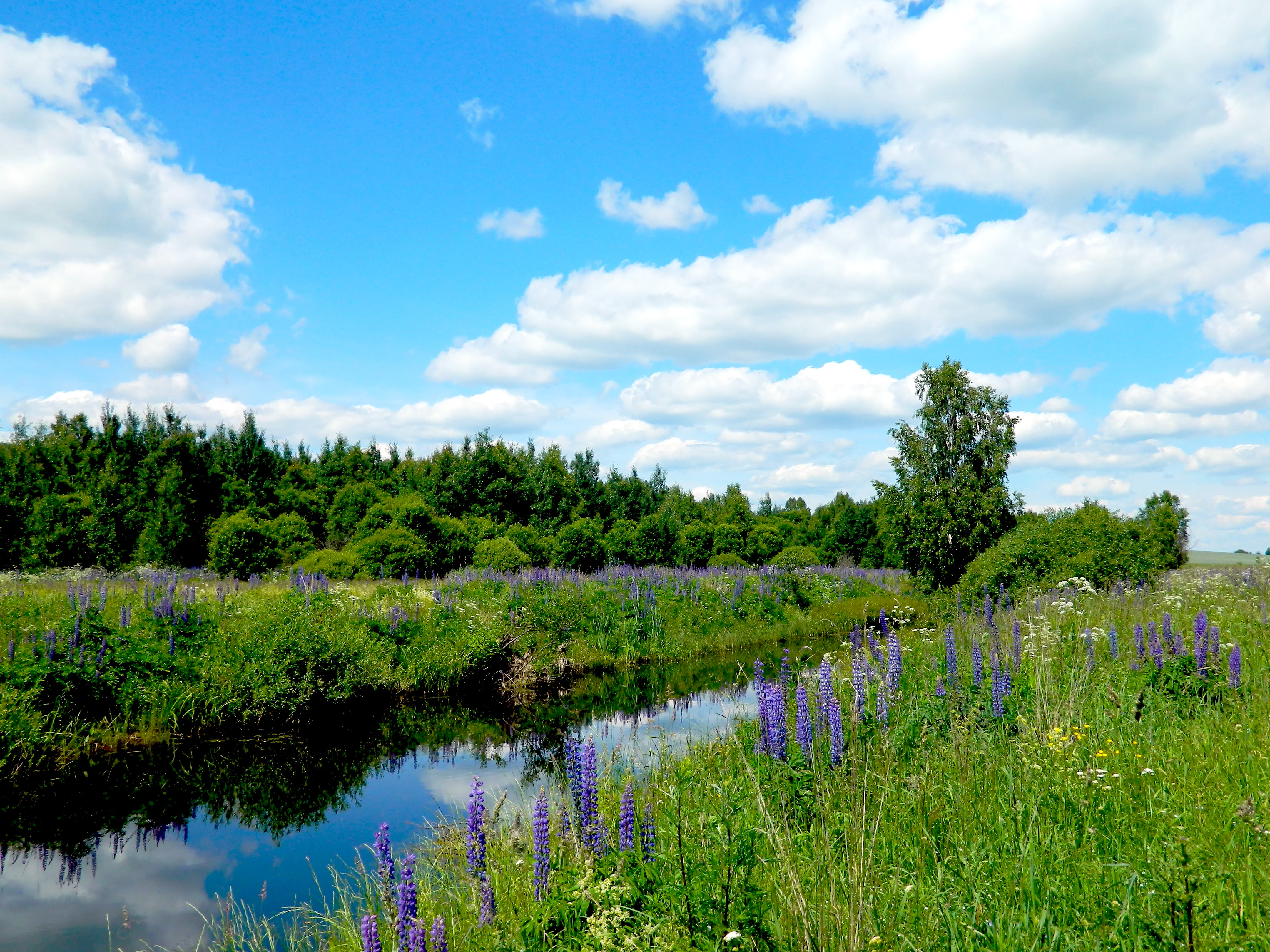 Река Нача (Крупский район), исток вблизи деревни Борки